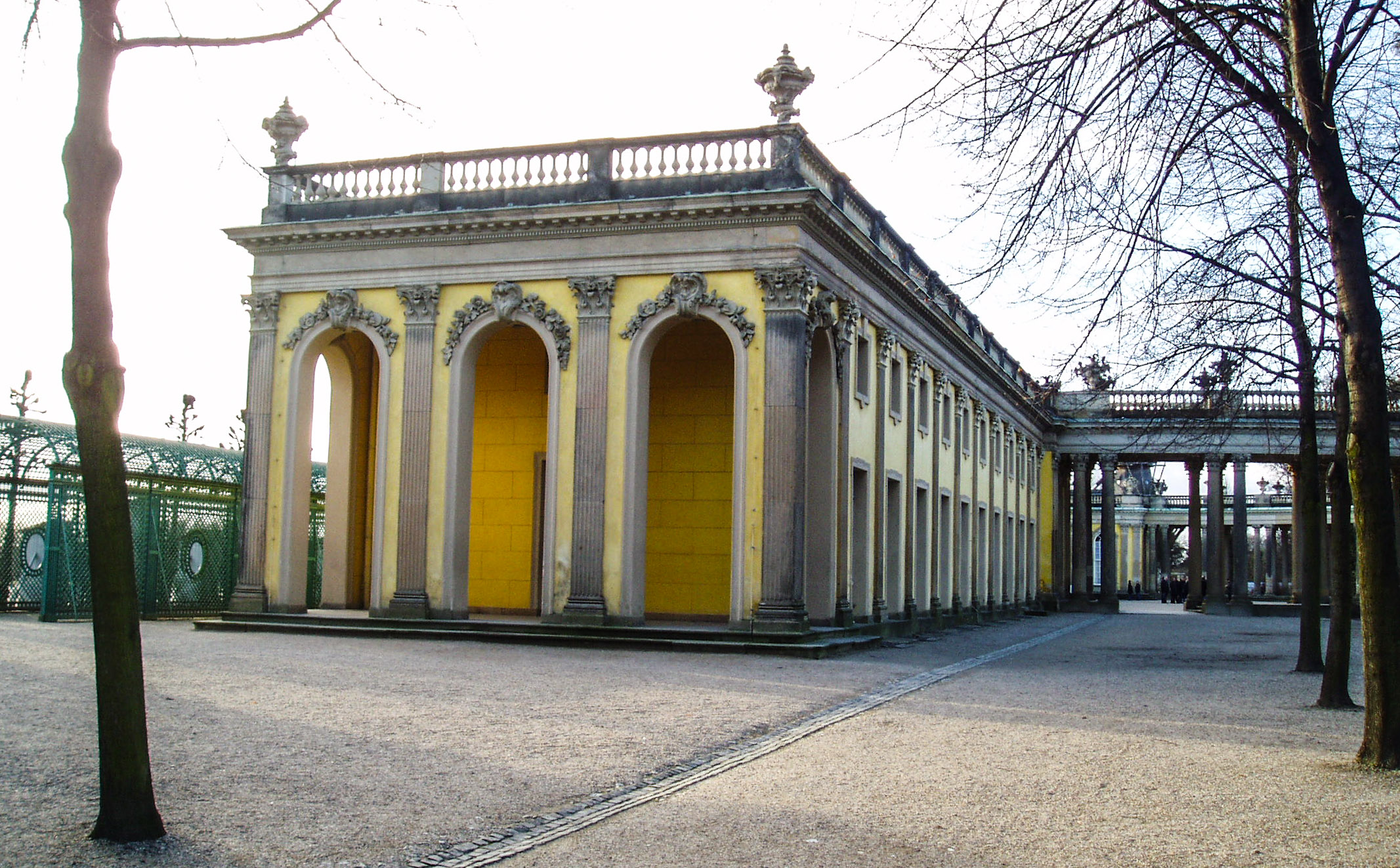 Schloss Sanssouci (östlicher Seitenflügel), Potsdam